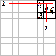 Sudoku